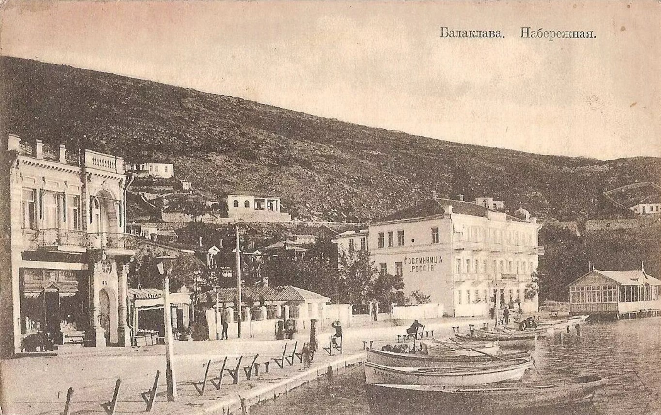 Balaklava's Embankment